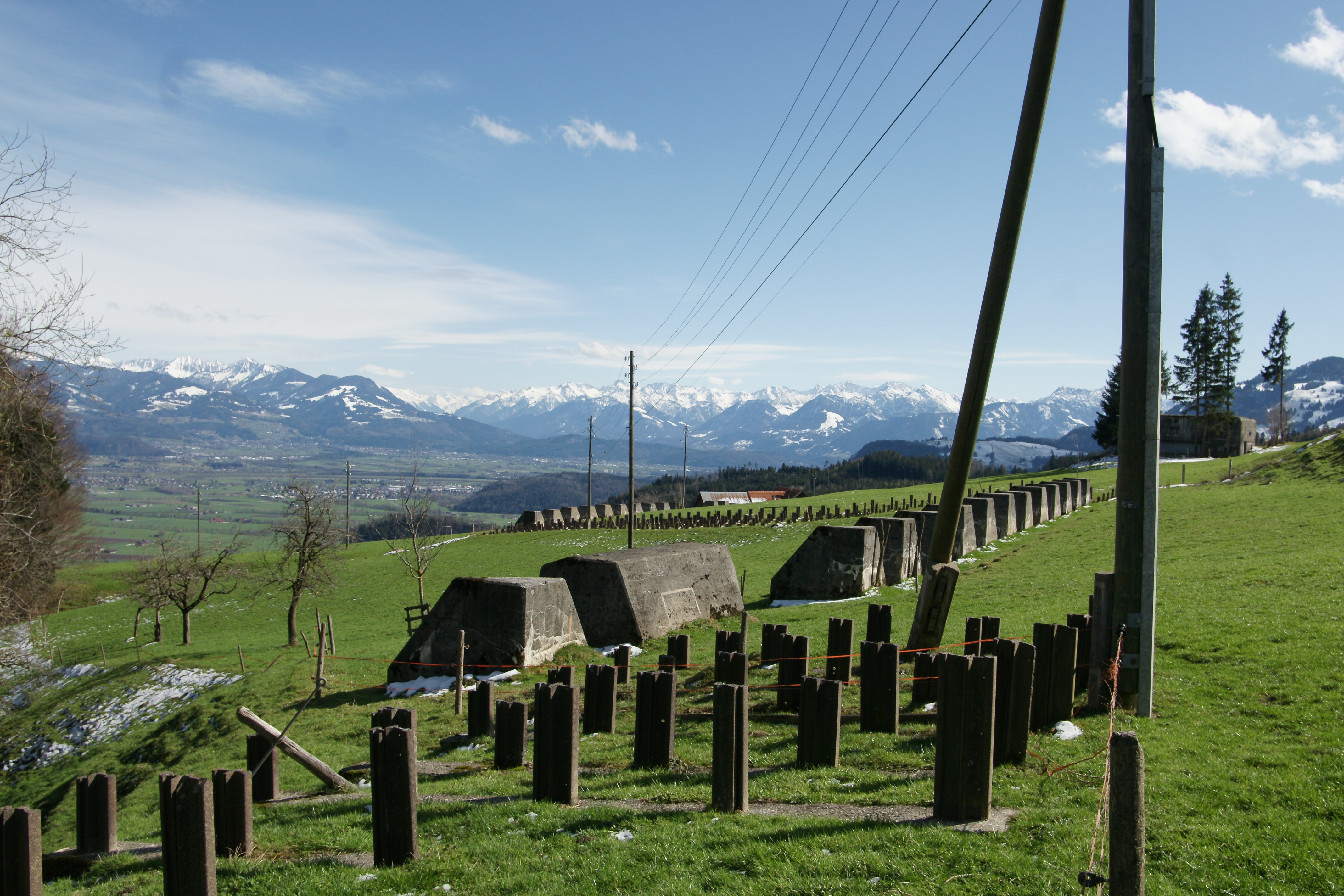 Auf 820m Seehöhe eine Höckerlinie,Tobleronen oder auch Panzersperre am Warmesberg bei Altstätten an der Kreuz-Stossstrasse. Der Blick richtet sich weiter ins obere Rheintal. Rechts im Hintergrund der Infanteriebunker Warmesberg A 5888